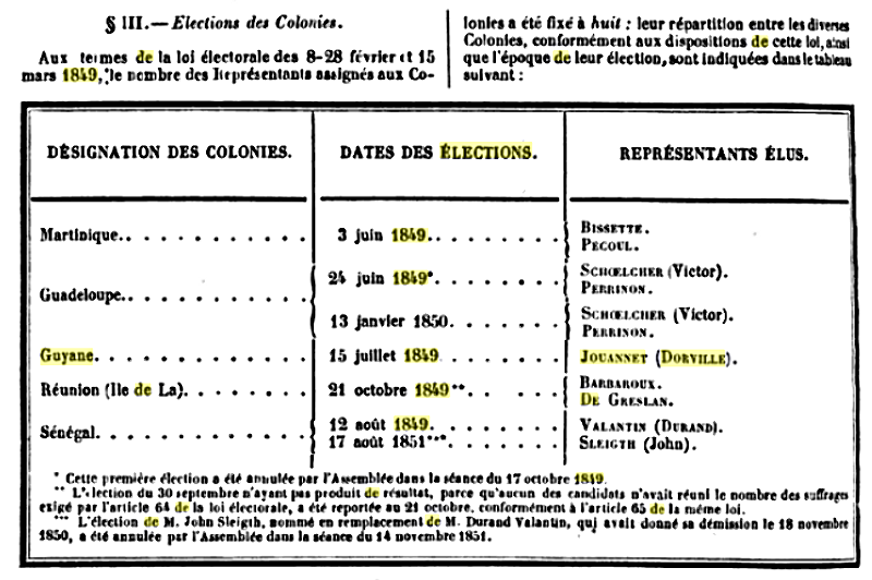 Résultats des élections de 1849 au parlement de la France. Liste des représentants élus par Martinique, Guadeloupe, Guyane, Ile de la Réunion, Sénégal. Extrait de Compte rendu des séances de l'Assemblée nationale législative. 28 mai 1849.